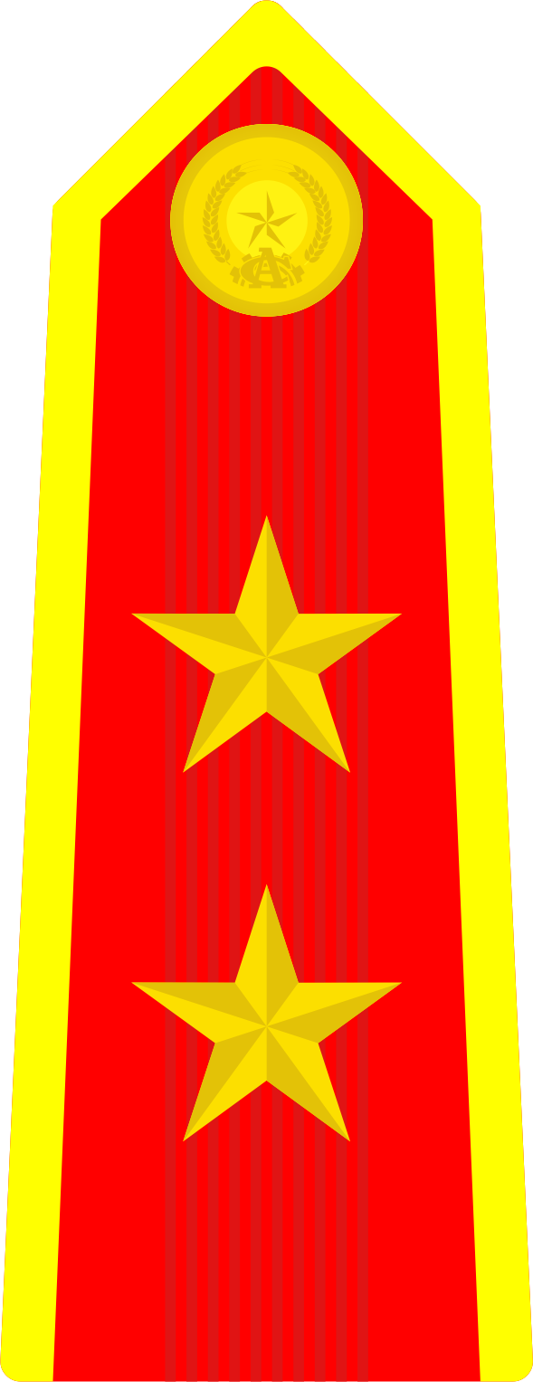 Cấp hiệu Trung tướng Công an